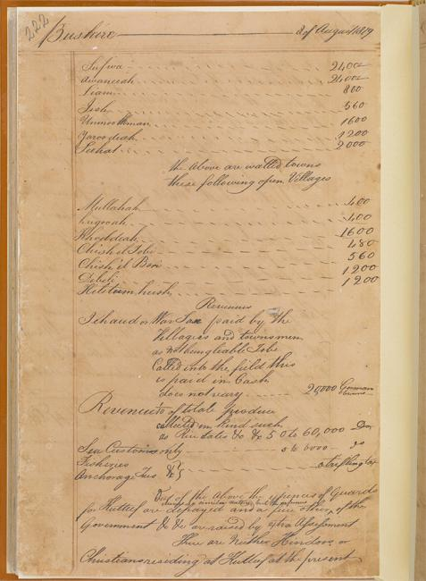 مُقتطف من أحد خطابات جورج سادلير يتضمن قائمة بالمدن وسكانها في منطقة الأحساء، بتاريخ ١٧ يوليو ١٨١٩.